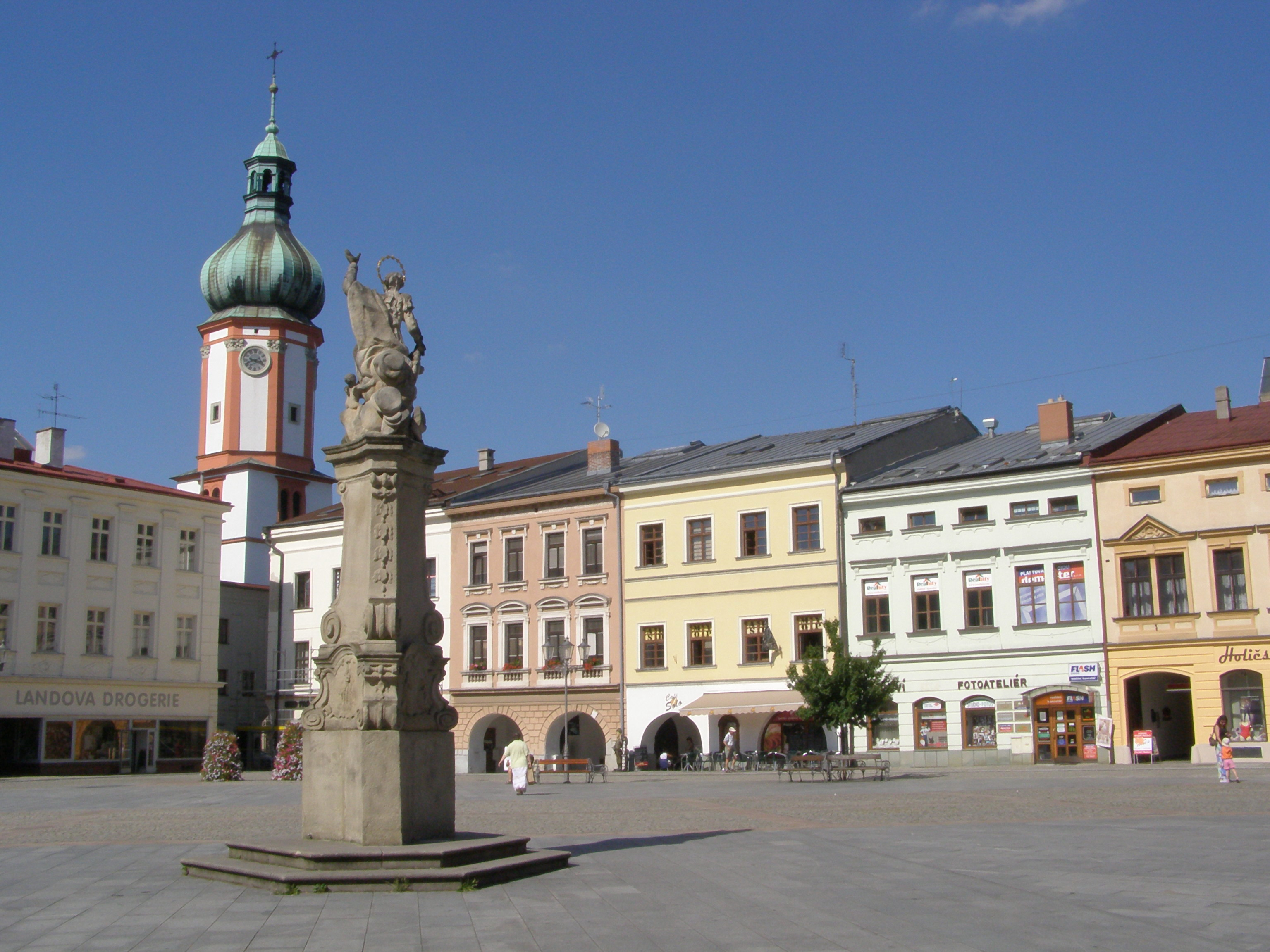 Místek, Náměstí Svobody, severní strana, vlevo socha Panny Marie, v pozadí kostel svatého Jakuba